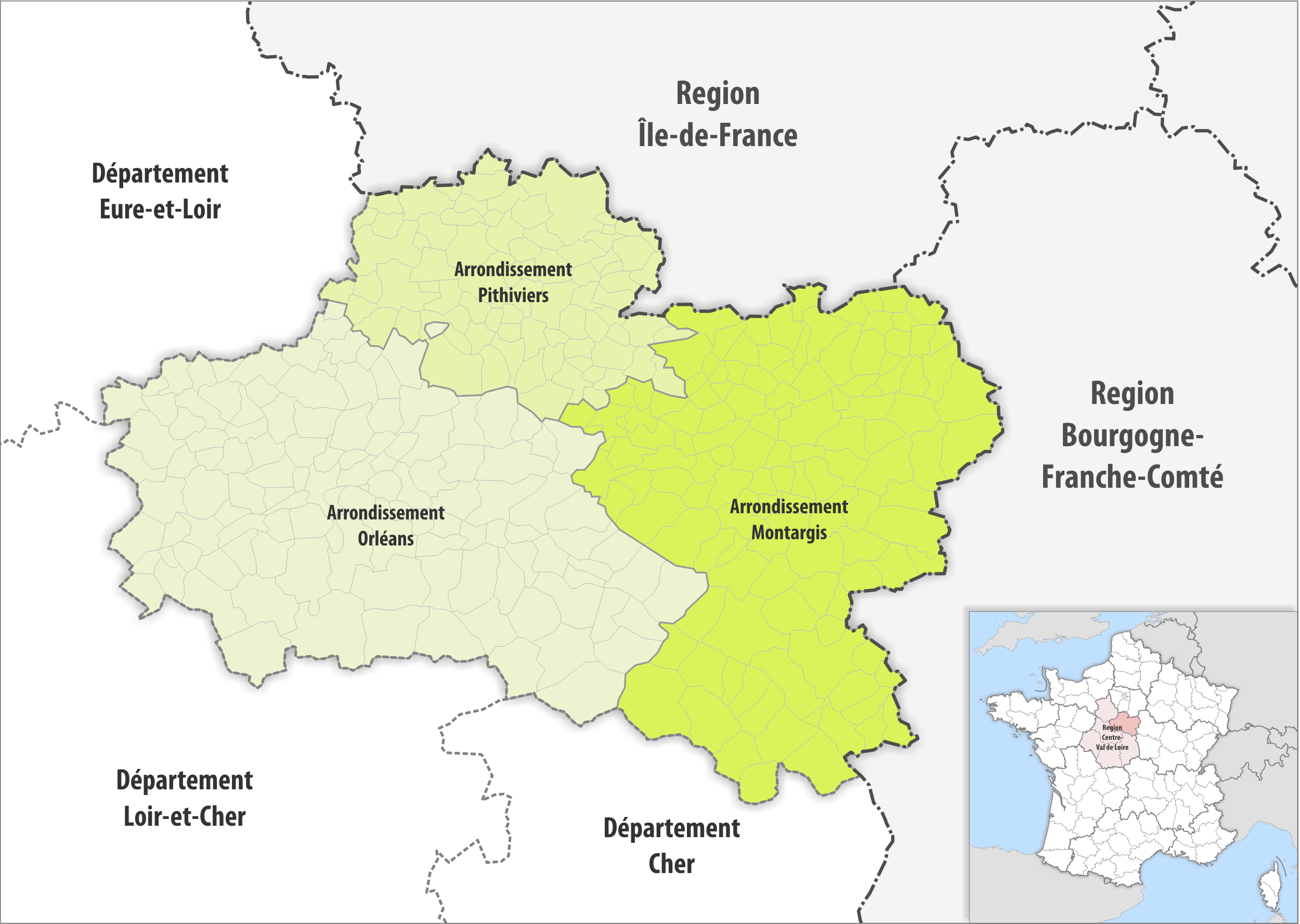 Gemeinden und Arrondissemente im Departement Loiret